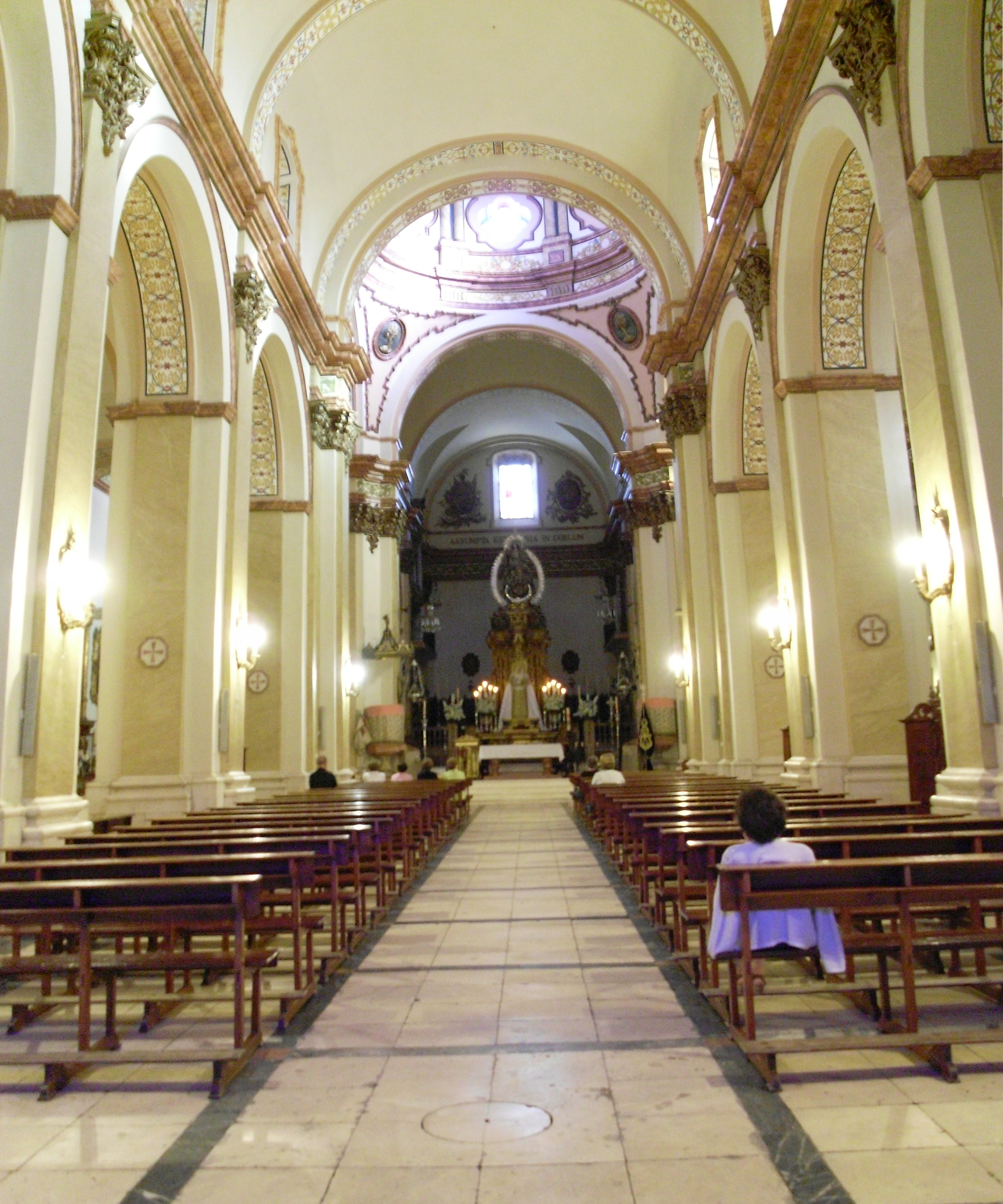 Interior de la Iglesia de Sta. María de Écija.